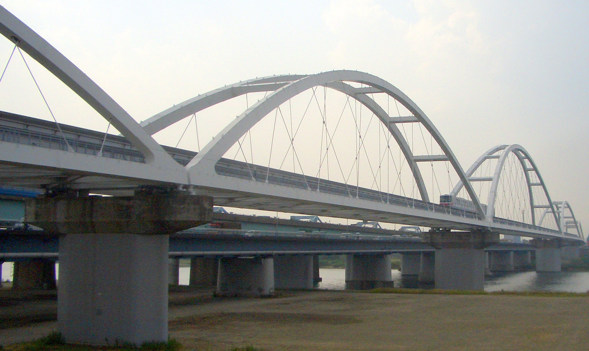 Torikai-ohhasi （Torikai-big-Bridge） 鳥飼大橋